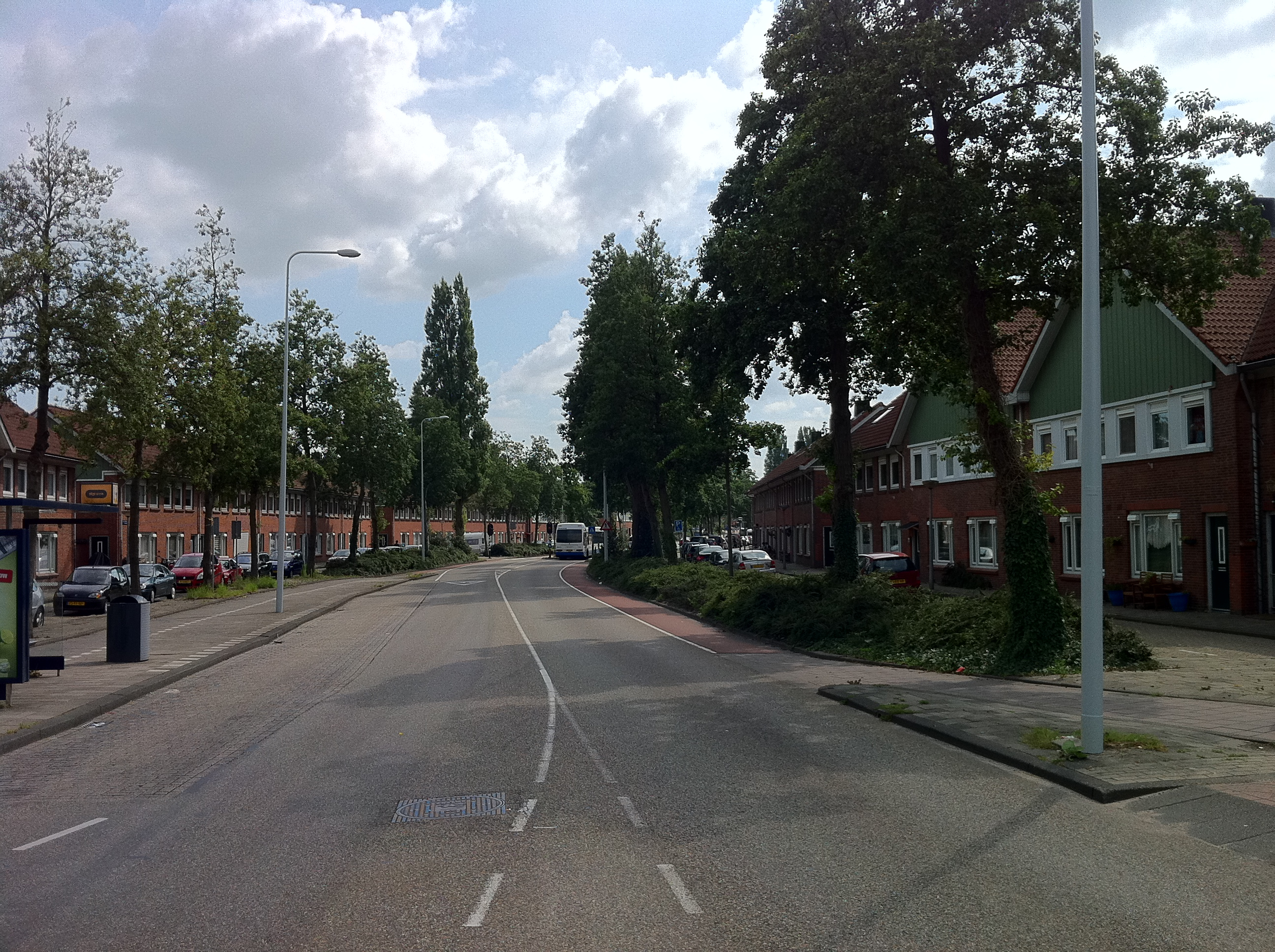 Tuindorp Buiksloot Amsterdam-Noord juli 2011